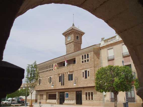 Ayuntamiento de Torre de Juan Abad